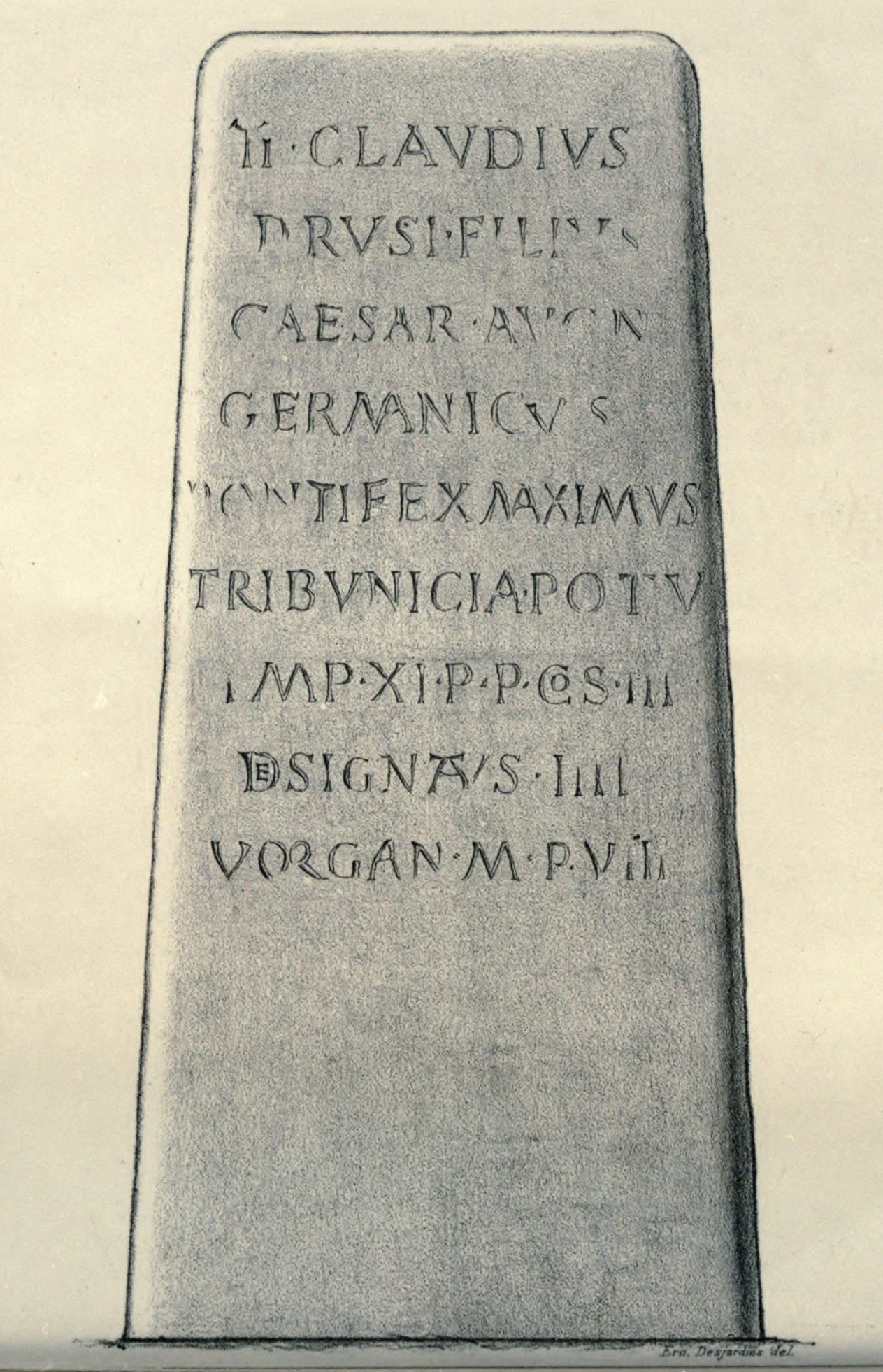 Lecture de Ernest Desjardins (1823-1886) du milliaire de Kerscao en Kernilis, conservé au Musée départemental breton de Quimper. Cf. CIL XVII2, 00411 = CIL 13, 09016 = ILTG 00478 = CAG-29, p 227 = AE 1956, +00001 = AE 1957, +00211 : Ti(berius) Claudius / Drusi Filius / Caesar August(us) / Germanicus / pontifex maximus / tribunicia pot(estate) V / imp(erator) XI co(n)s(ul) III / desi/gnatus IIII / Vorgan(io) mi(lia) p(assuum) VI. La borne se trouvait initialement à Kernilis (Finistère)